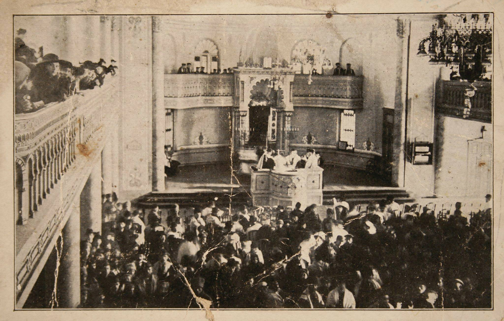 Беларуская (тарашкевіца): Менск (Miensk), Харальная сынагога